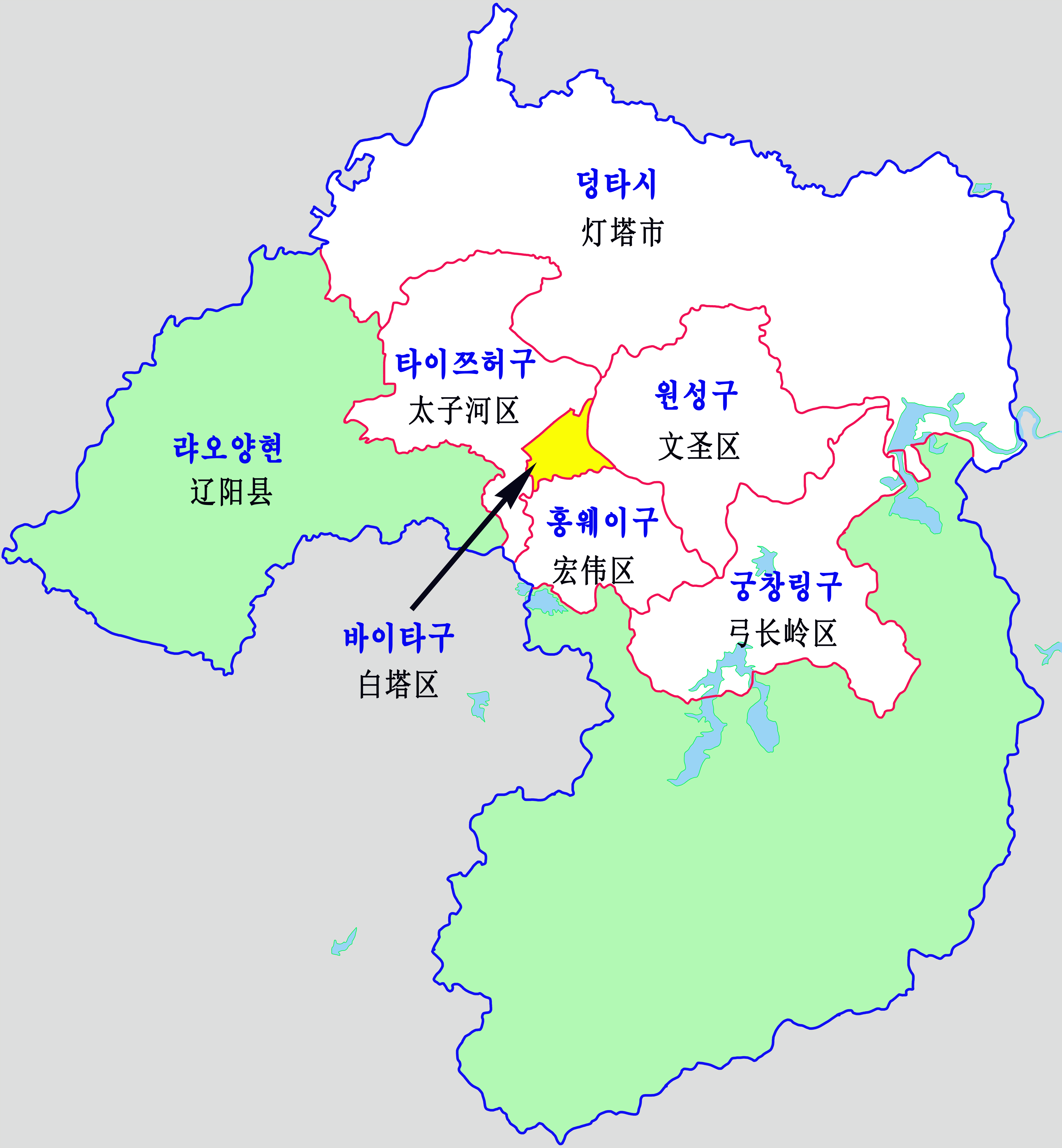 랴오양시 행정지도